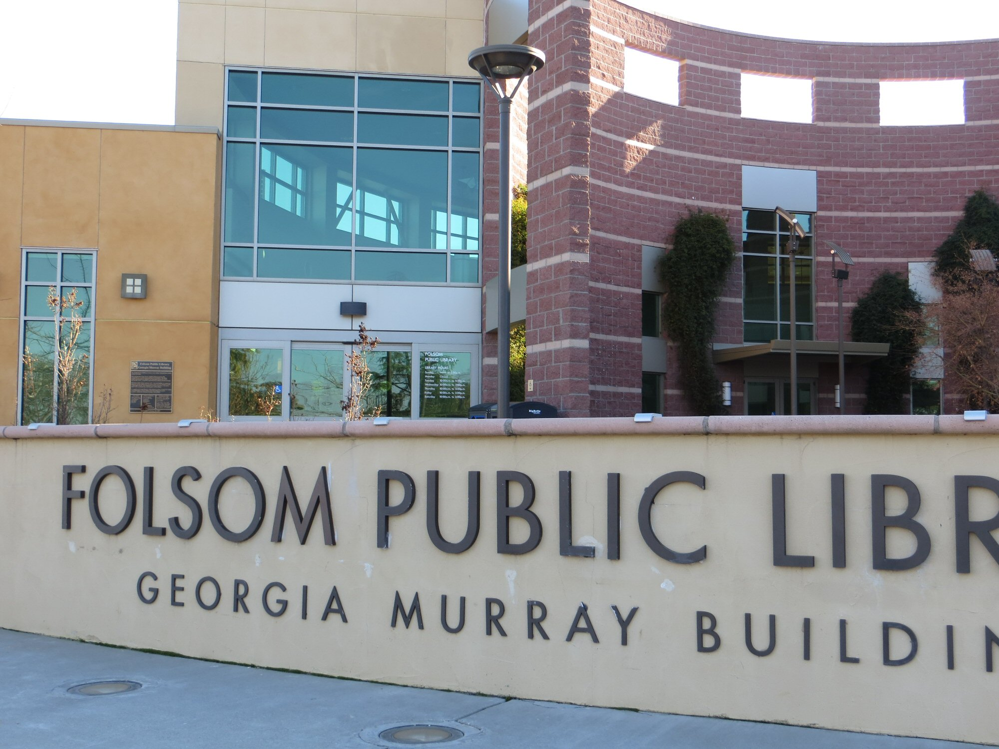 Folsom CN 10